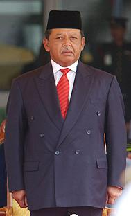 The Yang di-Pertuan Agong of Malaysia DYMM Tuanku Raja Syed Sirajuddin Jamalullail